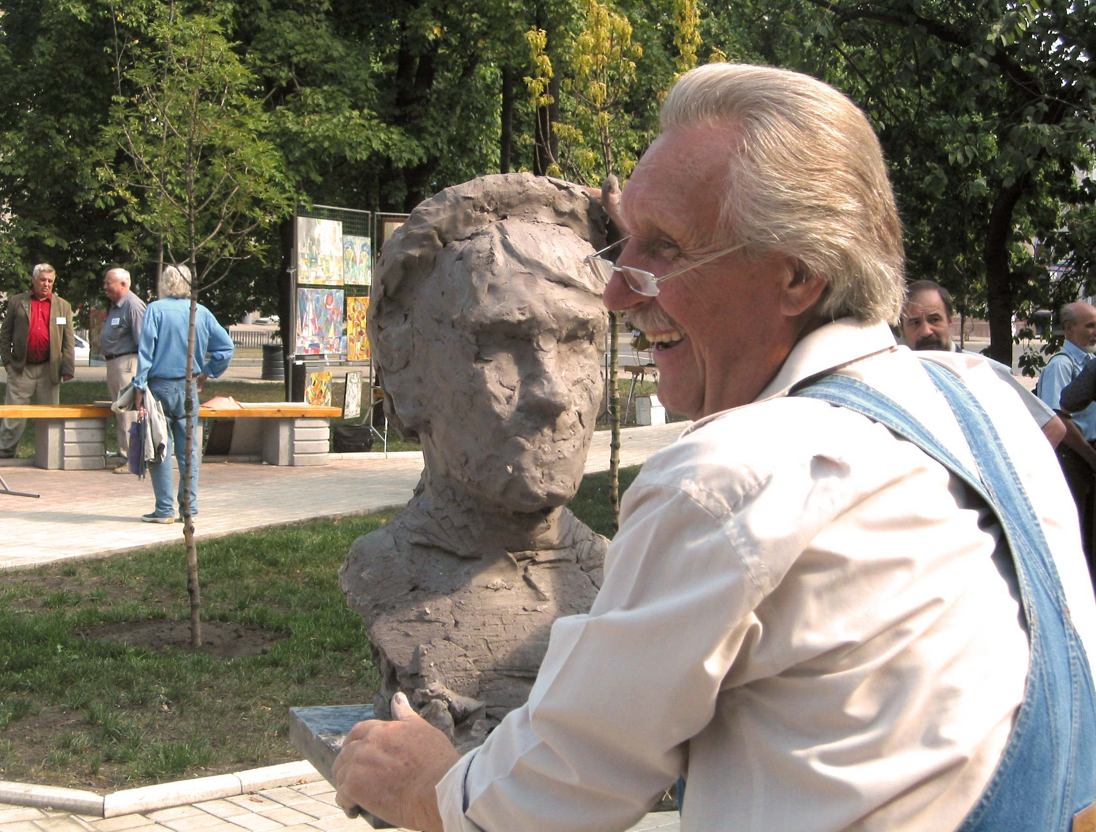 Скорых Александр Митрофанович — председатель Донецкого отделения Национального союза художников Украины, скульптор. Фотография сделана во время праздника Театрального сквера.